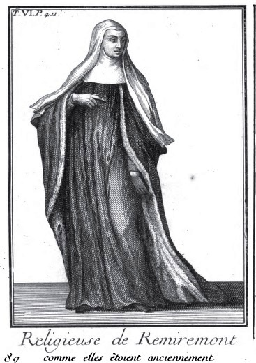 Religieuse de Remiremont - Gosselin - 1718 - Histoire Des Ordres Monastiques